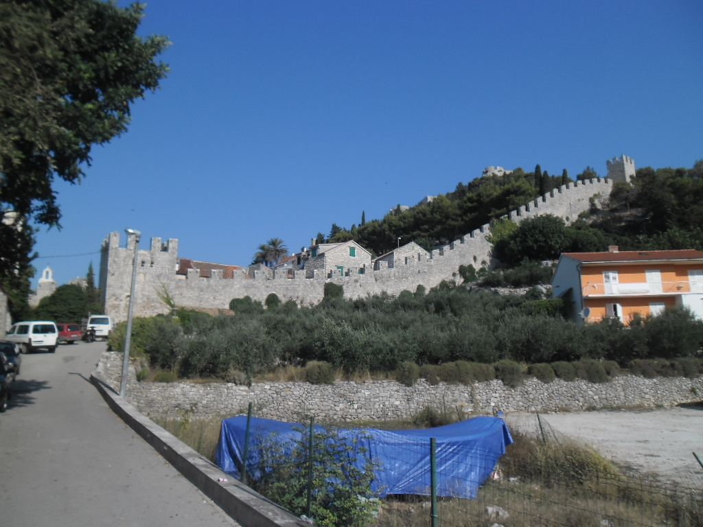 grad Hvar